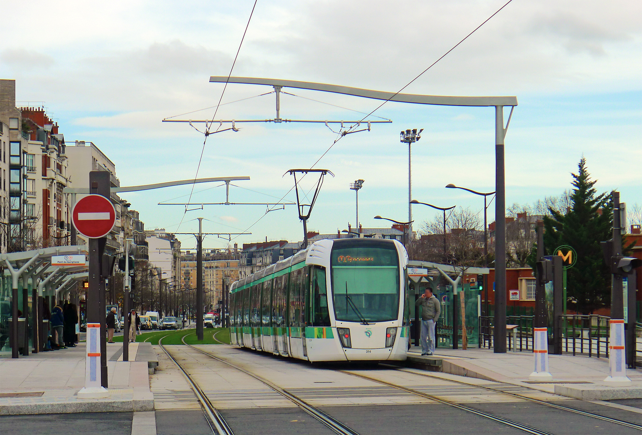 Porte de Charenton - Paris XII